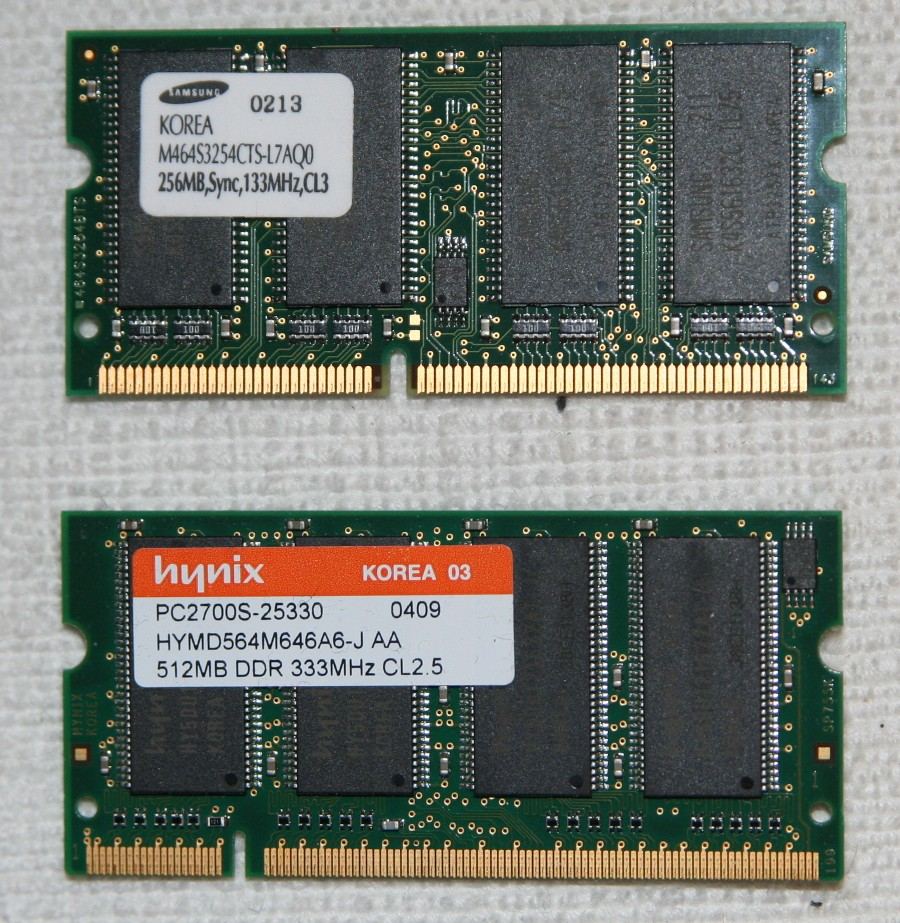 SD-Ram und DDR Ram für Notebooks